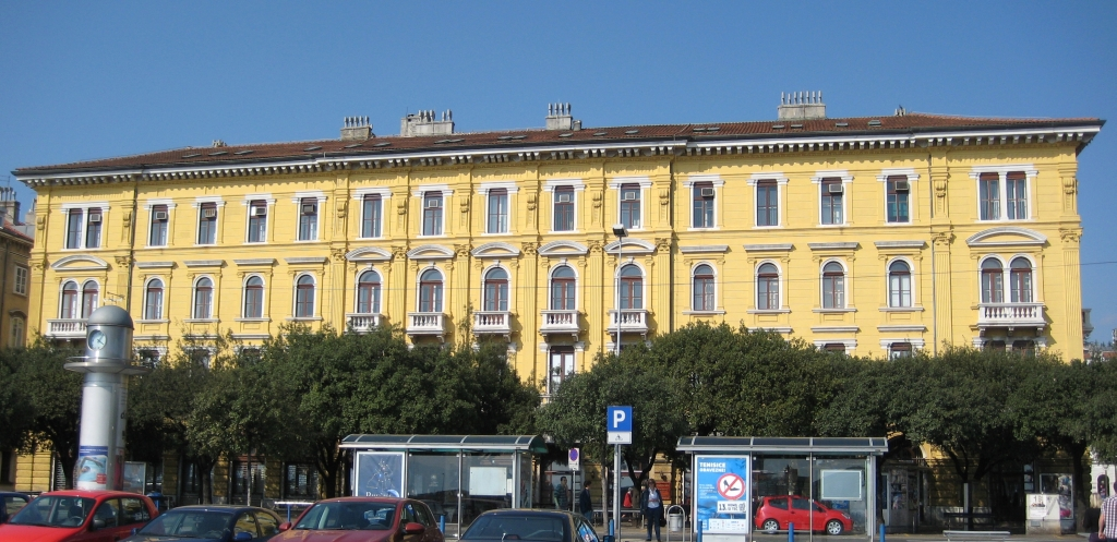 Zgrada Administracije u Rijeci.